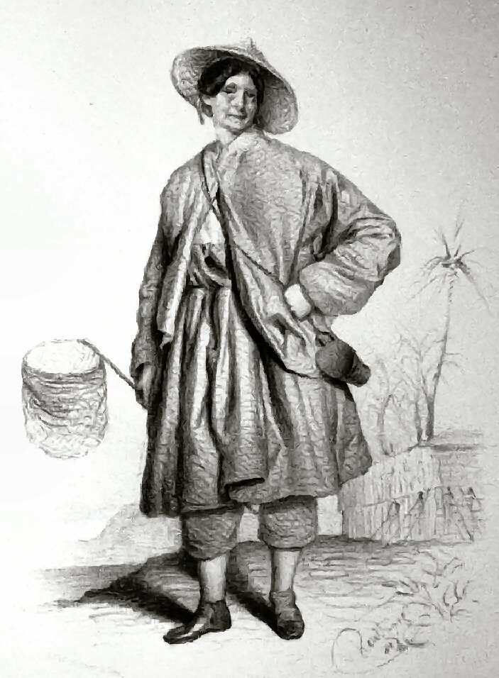 Ida Pfeiffer, Lithographie von Adolf Dauthage